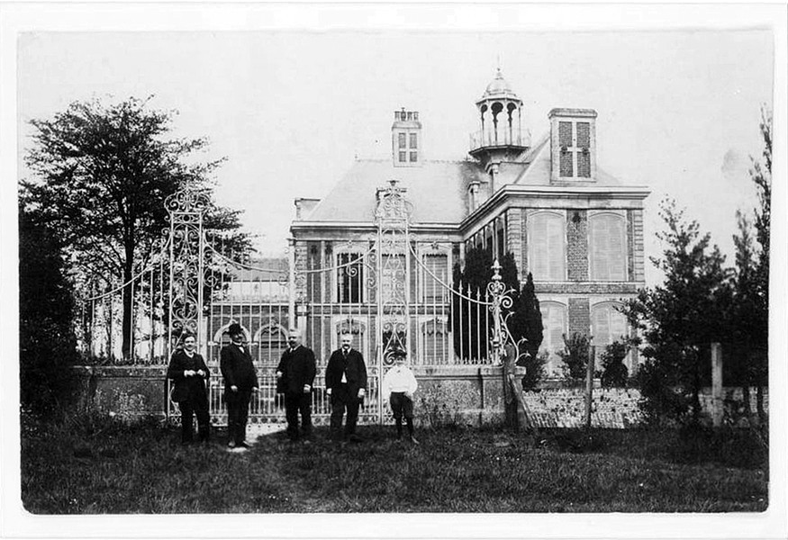 Photographie ancienne montrant le château de Béthencourt (Nord) avant la Première Guerre mondiale